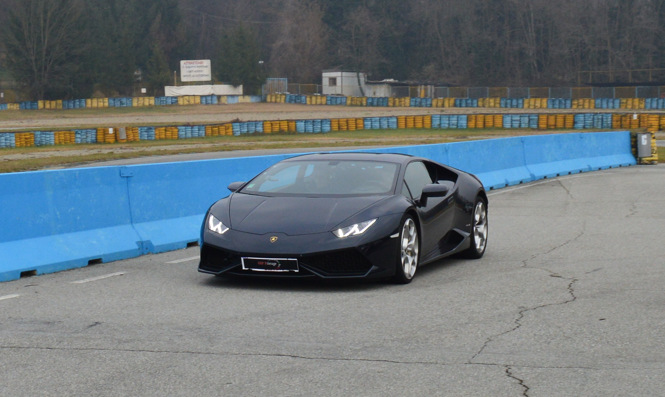 Lamborghini Huracán nel circuito di Lombardore.